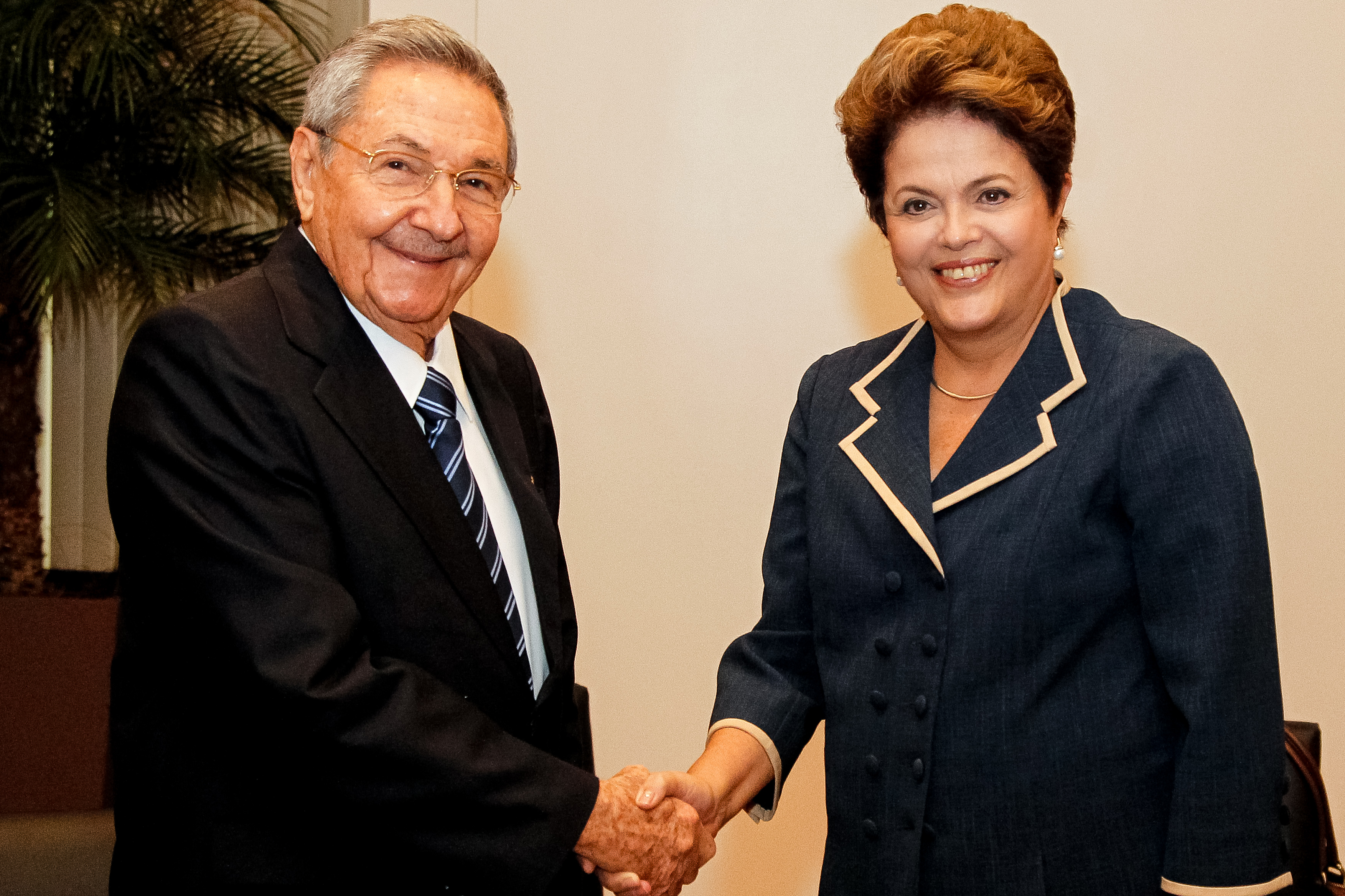 Presidenta Dilma Rousseff durante encontro com o presidente de Cuba, Raúl Castro. Rio de Janeiro - RJ, 22/06/2012 Foto: Roberto Stuckert Filho/PR